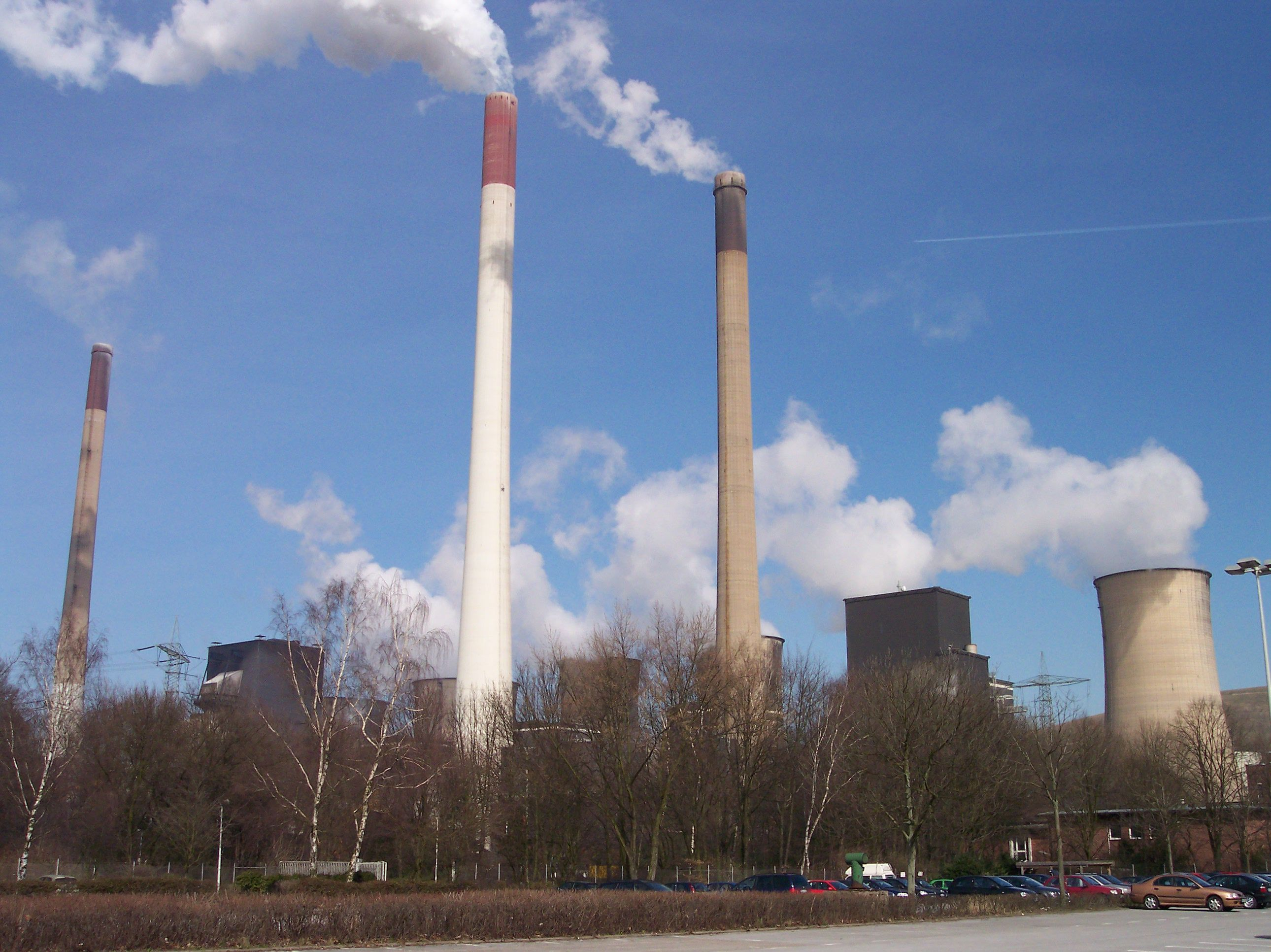 Gelsenkirchen, Kraftwerk Scholven von Südwesten